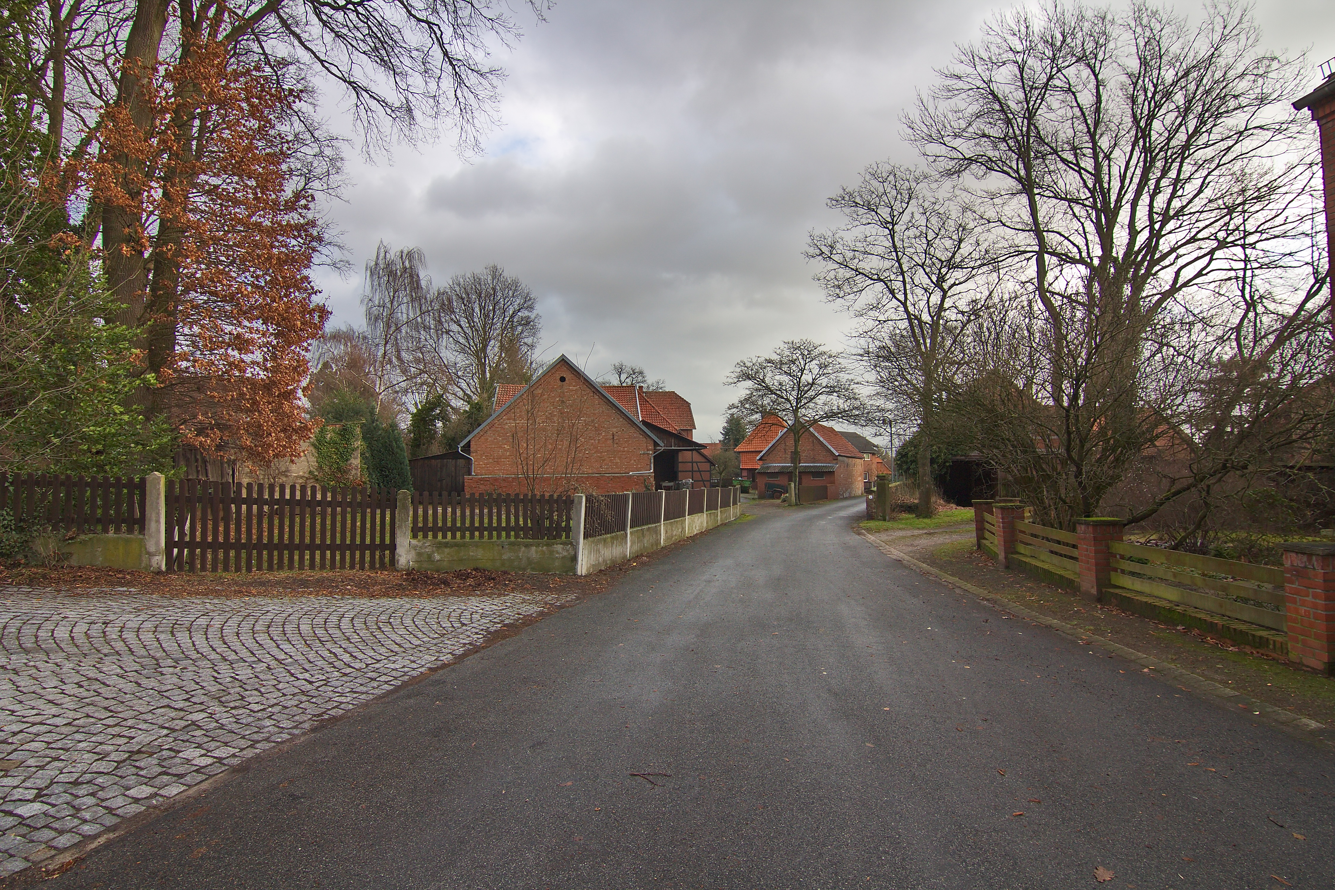 Blick auf die denkmalgeschützte Wipperstraße in Edemissen, Niedersachsen, Deutschland